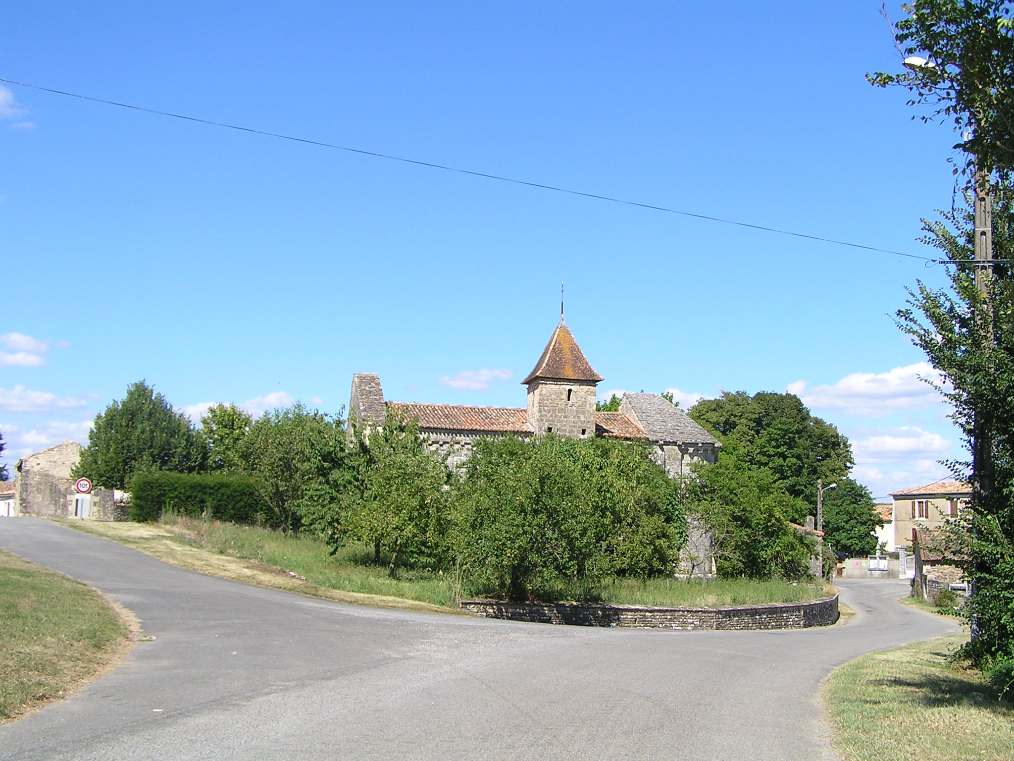 église d'Empuré, Charente, France